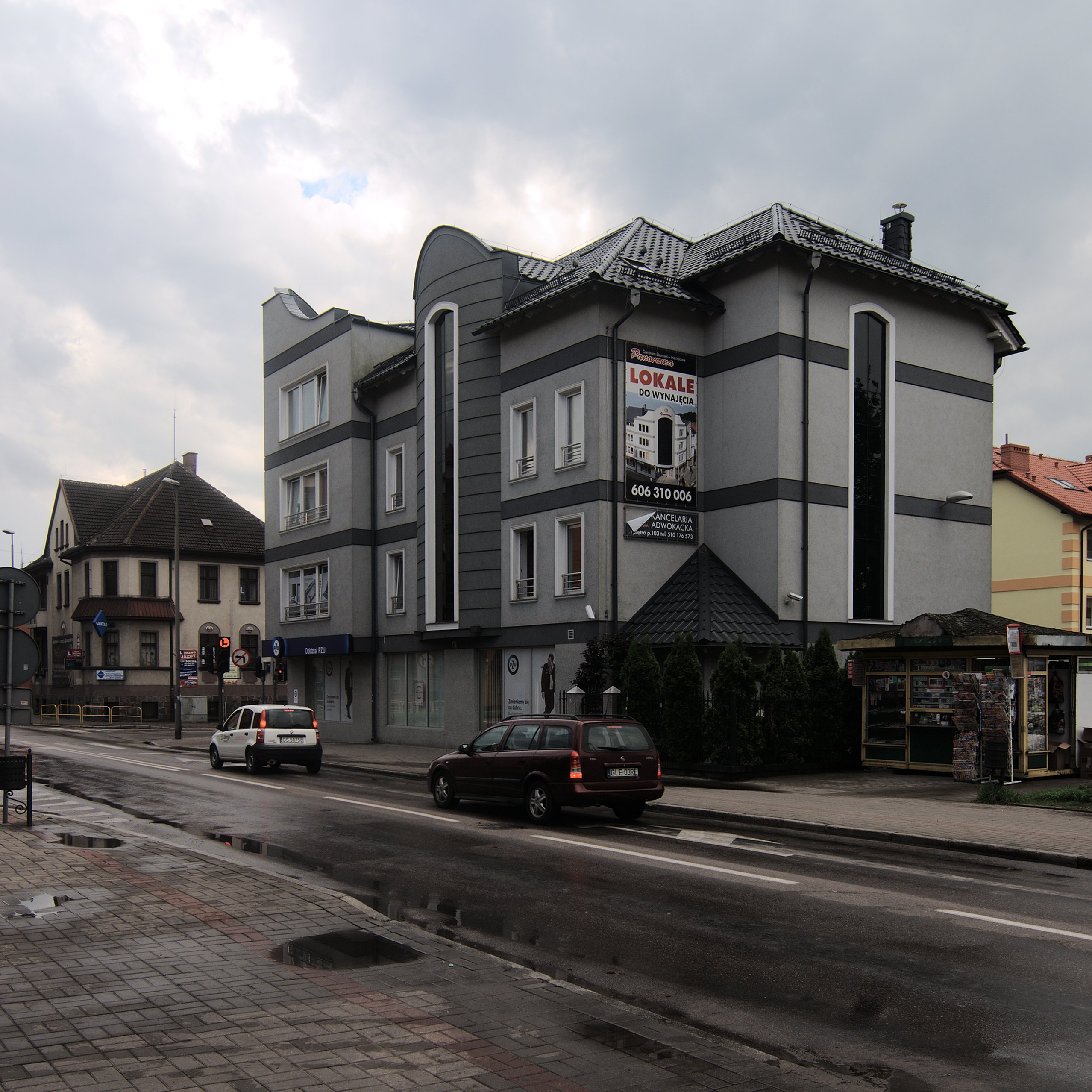 Lebork. Galeria handlowa Panorama.